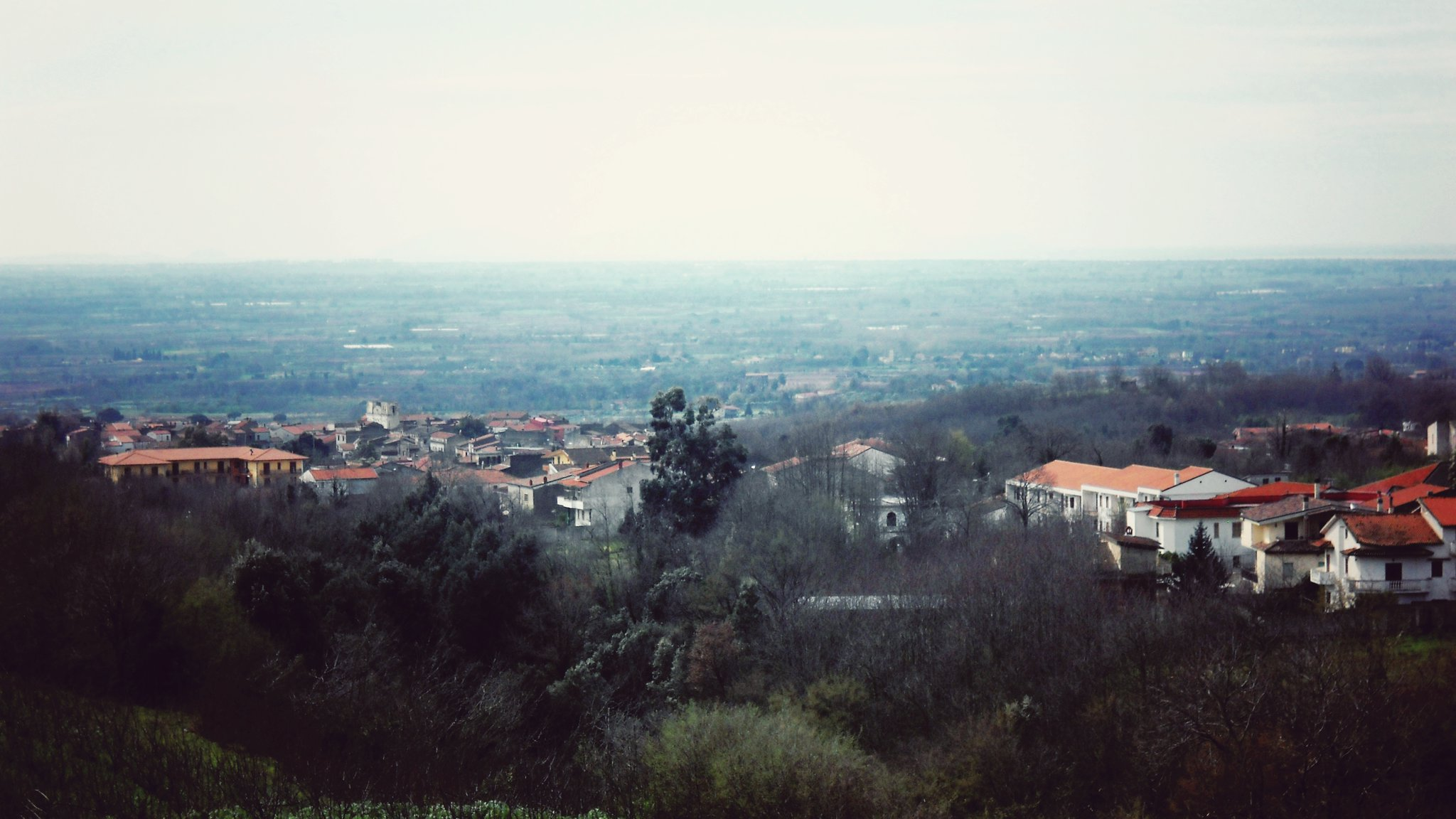 Panorama di Casale di Carinola dalla vicina San Giuliano